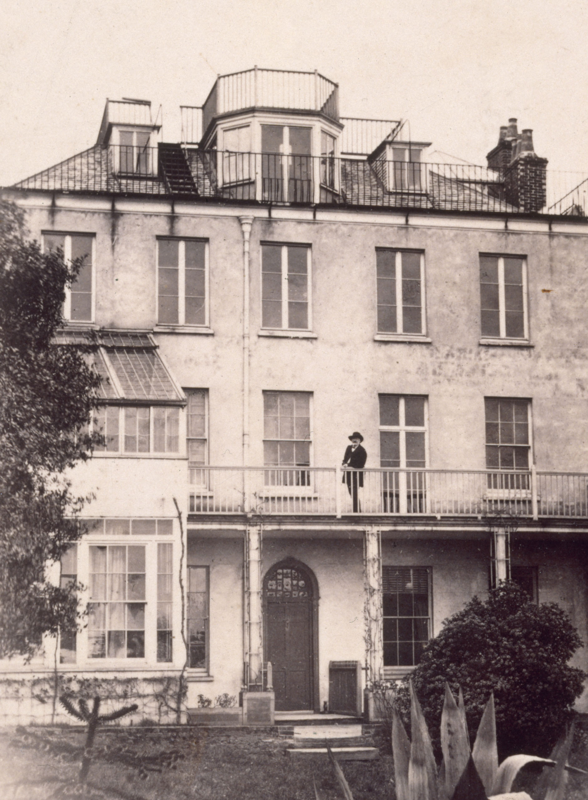 Victor Hugo sur la terrasse de Hauteville House de Guernesey, en exil de 1856 à 1870.